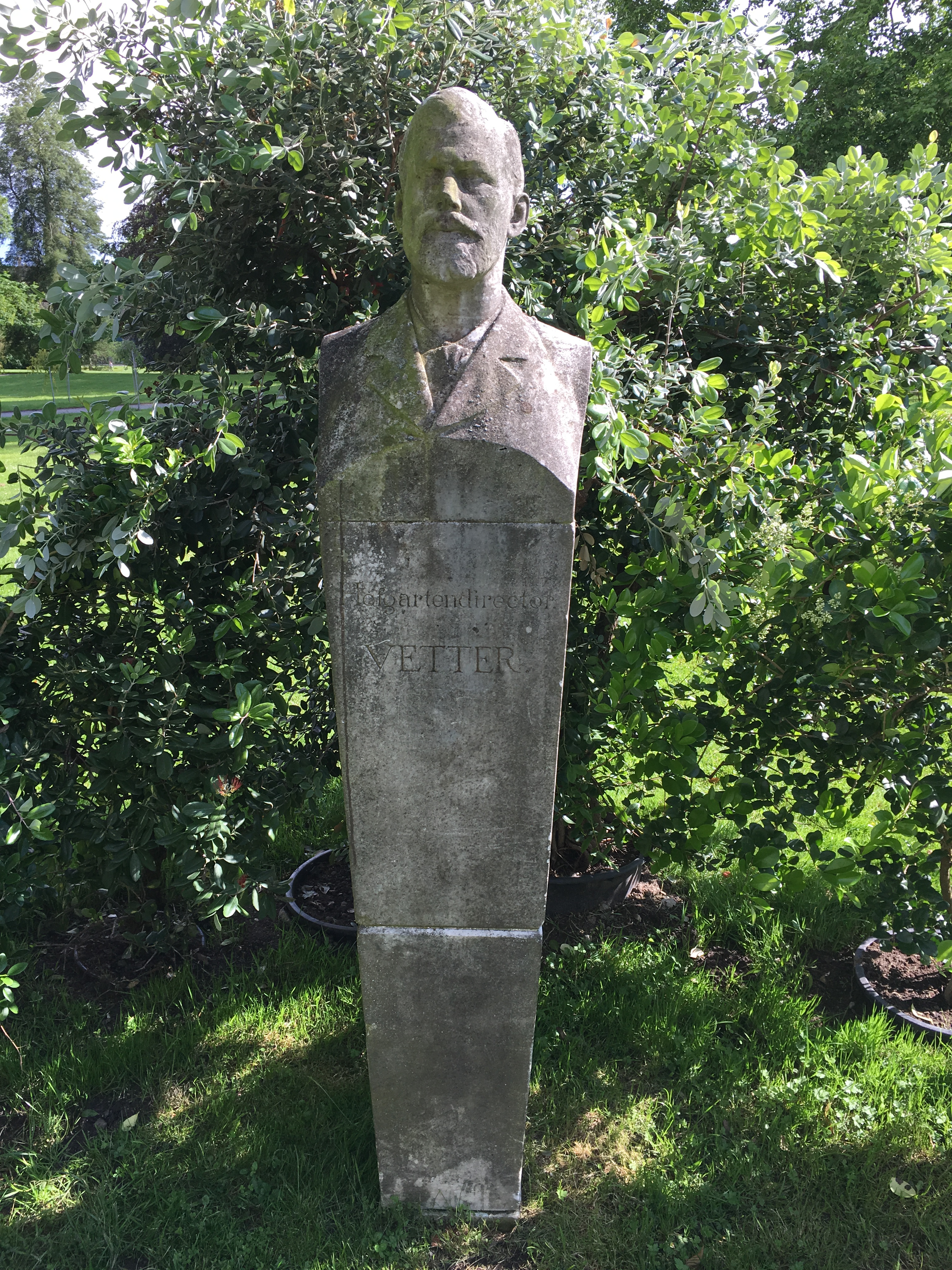 Statue des Hofgärtners Vetter